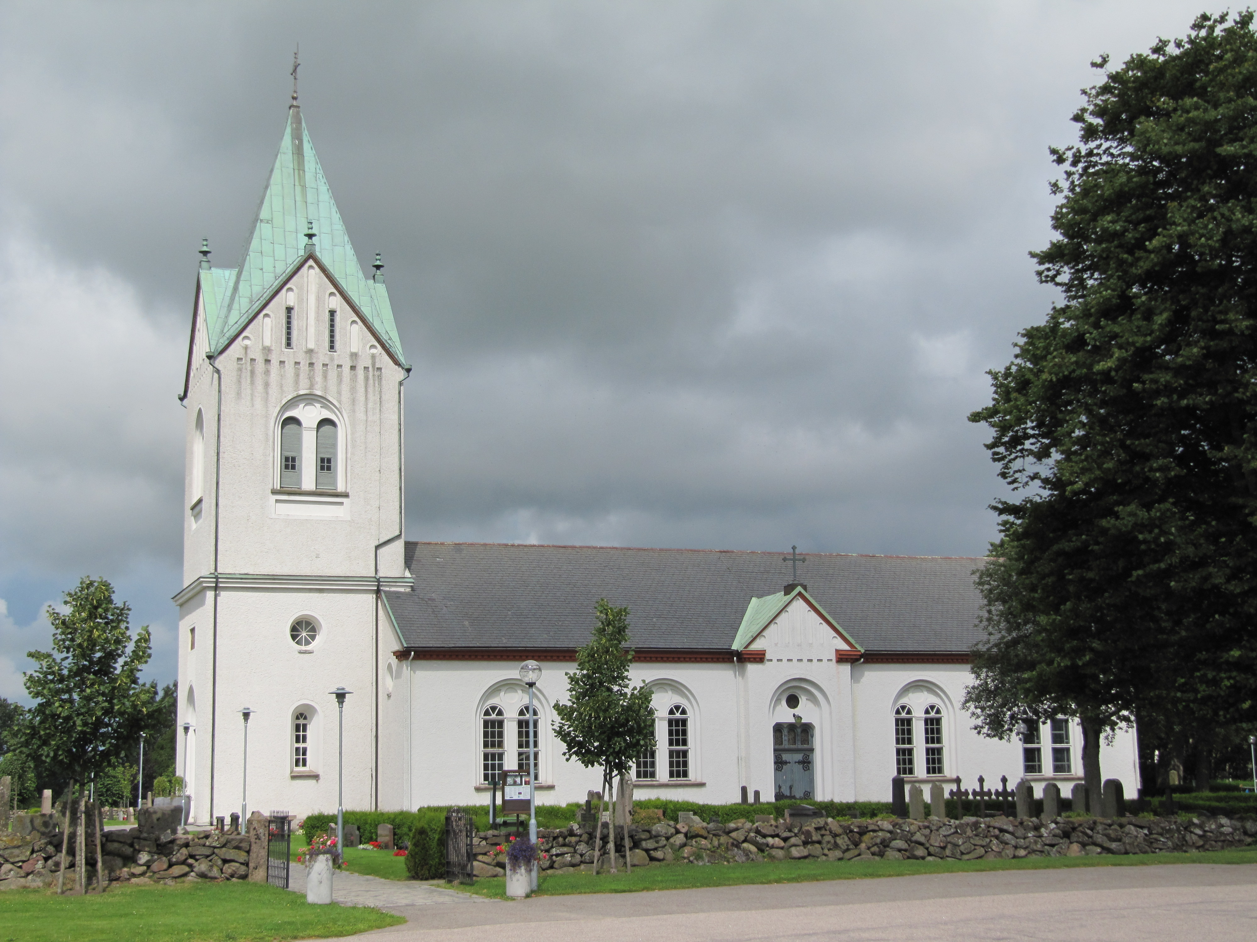 Tvååkers kyrka